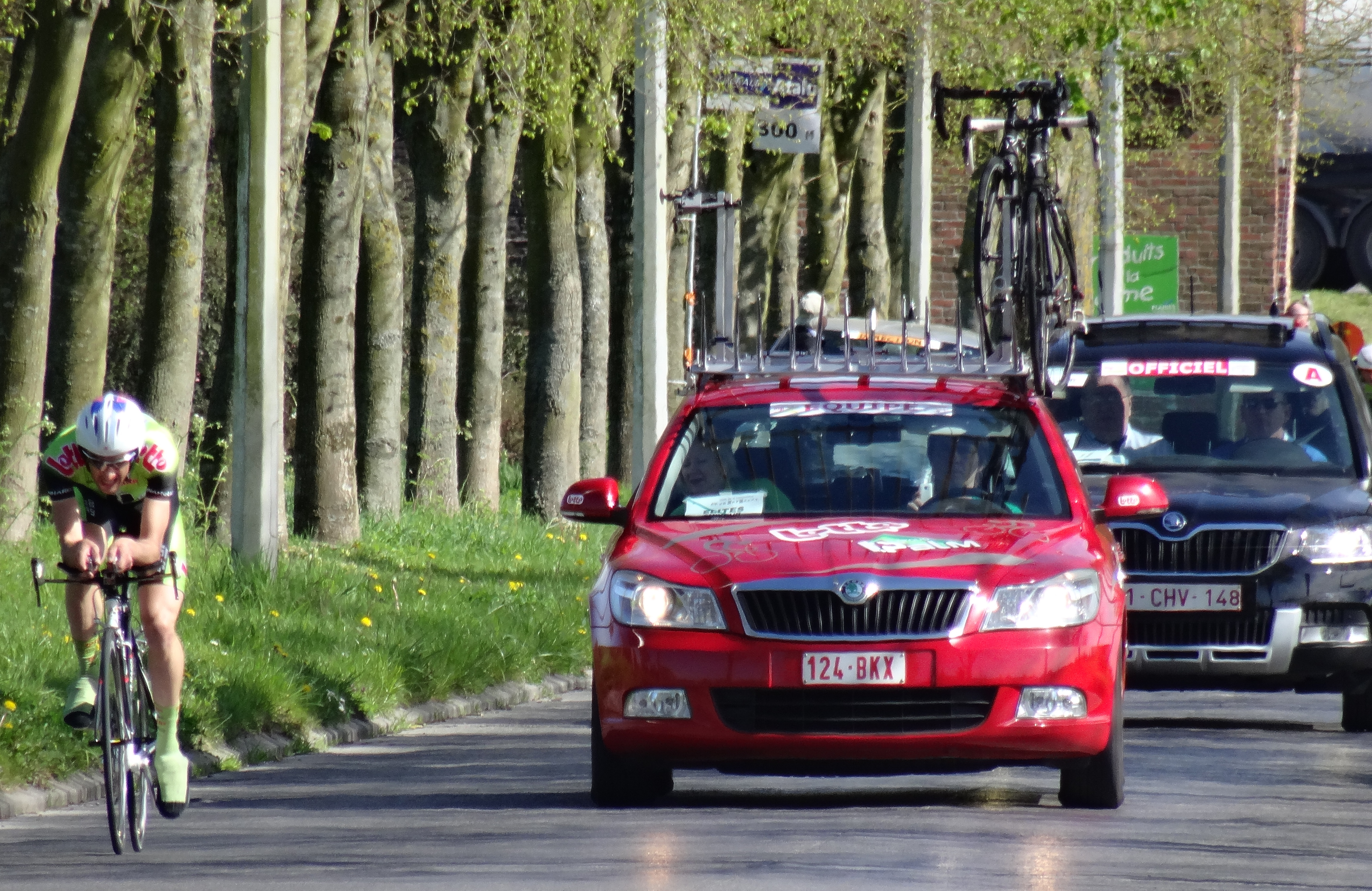 Triptyque des Monts et Châteaux 2014, étape 2a, 5 avril 2014, contre-la-montre individuel à Bernissart. The creation of these files was made possible thanks to the organizers of the Triptyque des Monts et Châteaux 2014 English | français | +/− Depicted team: T.Palm-Pôle Continental Wallon The creation of these files was made possible thanks to the organizers of the Triptyque des Monts et Châteaux 2014 English | français | +/−